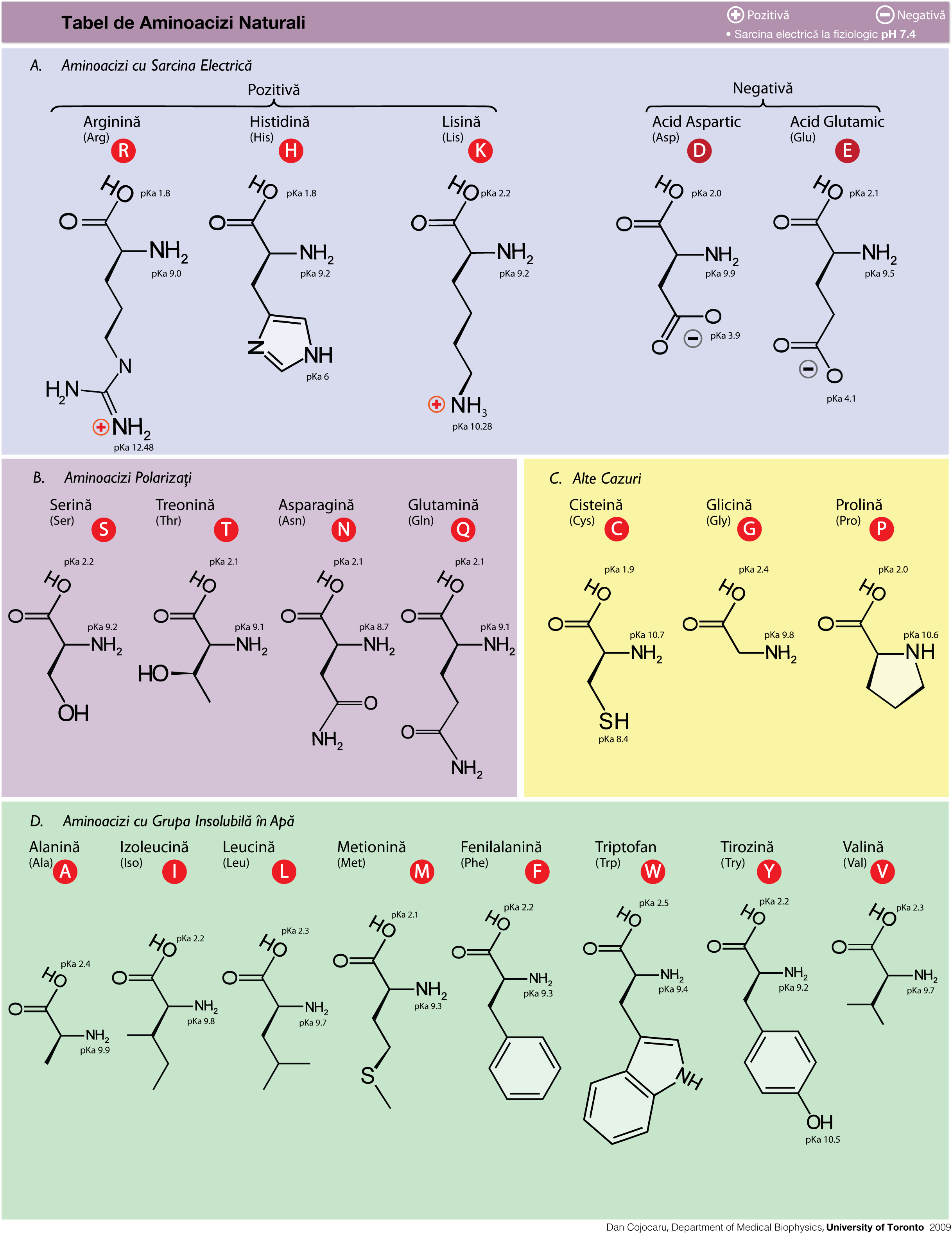 Aminoacizi